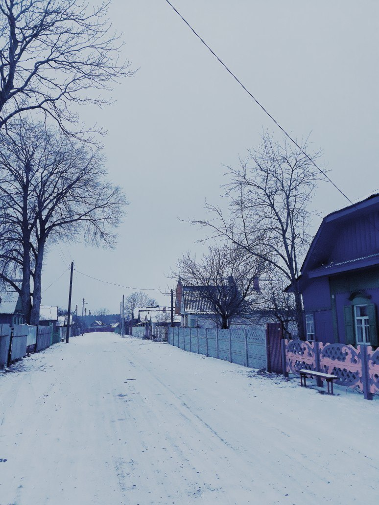 Расава, вуліца Лясная, цэнтральная вуліца старой часкі вёскі